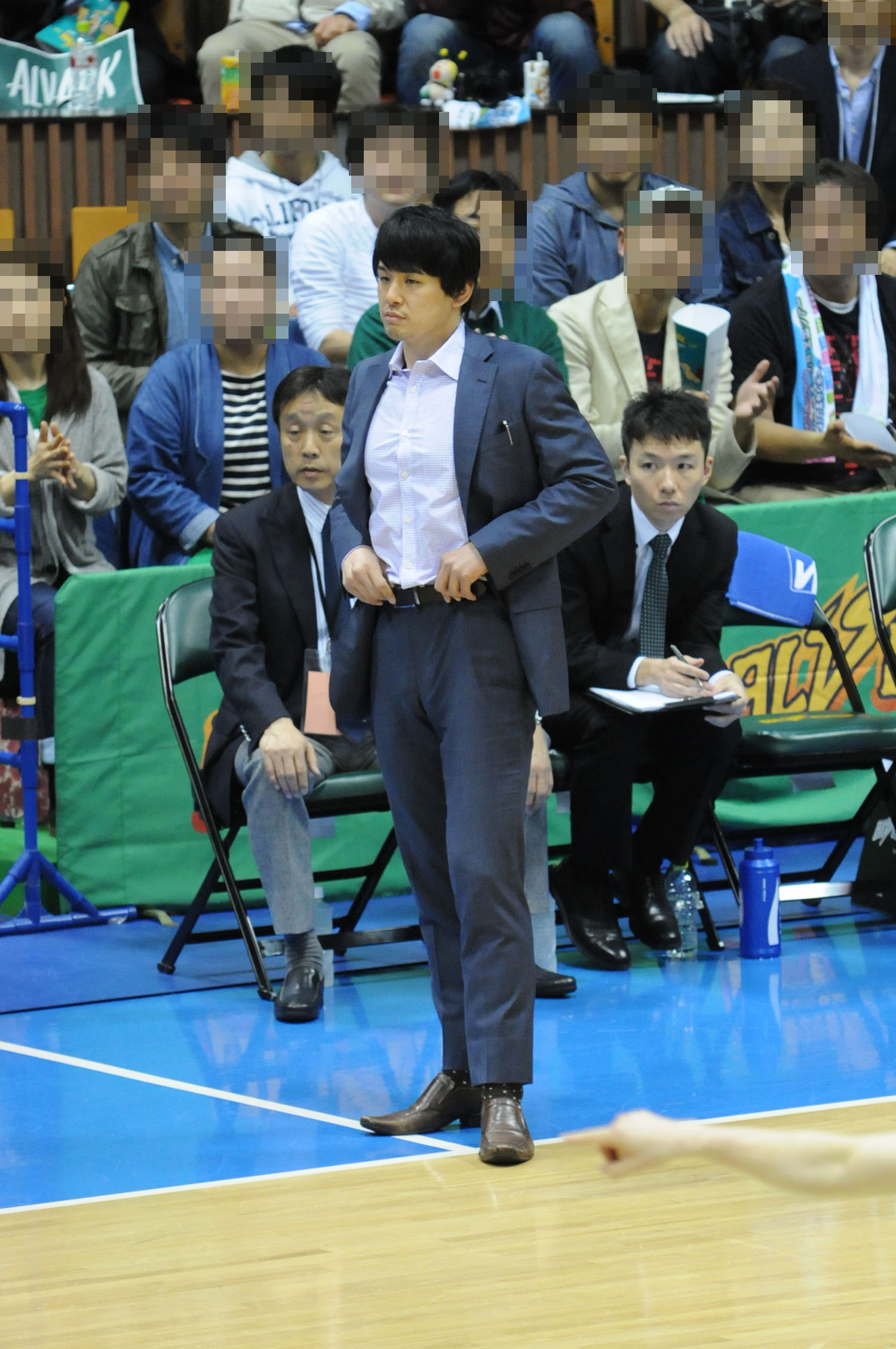 トヨタ自動車アルバルク東京、伊藤拓摩HC。国立代々木競技場第二体育館で。